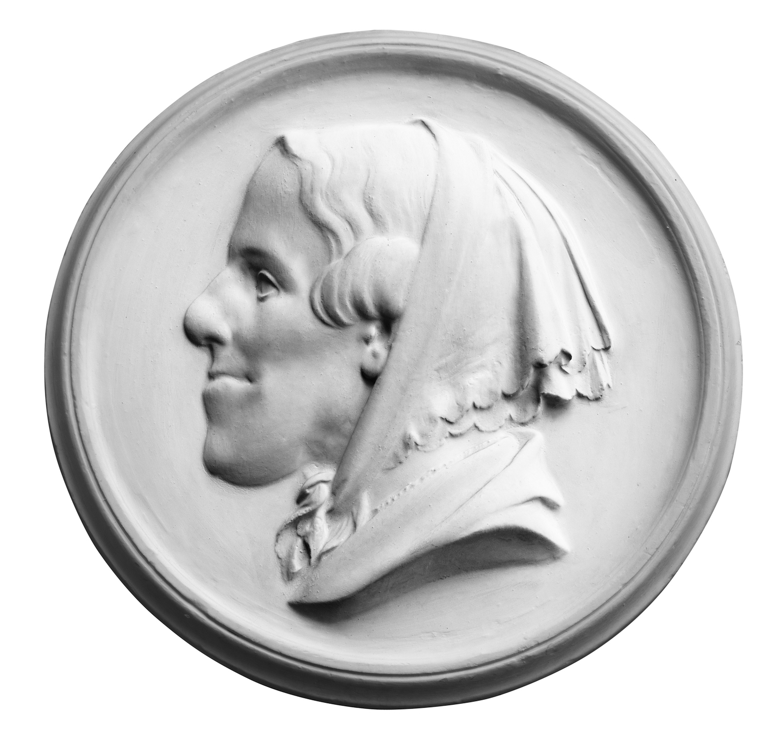 Portrait Mathilde Escher